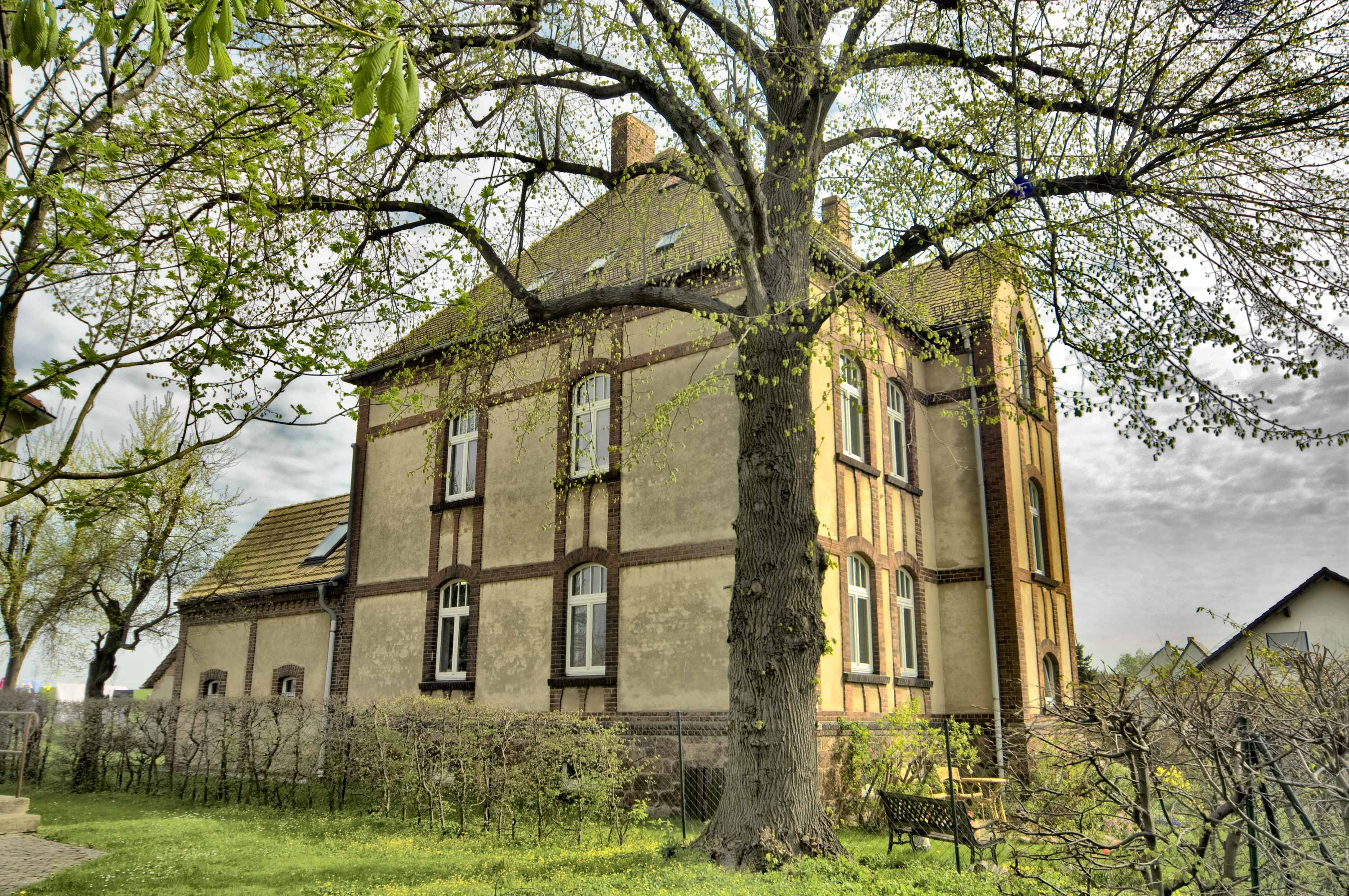 Ehemaliges Pfarramt Liptitz, Gemeinde Wermsdorf, Sachsen